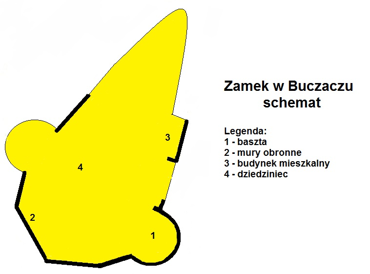 Buczacz. Hipotetyczny schemat zamku